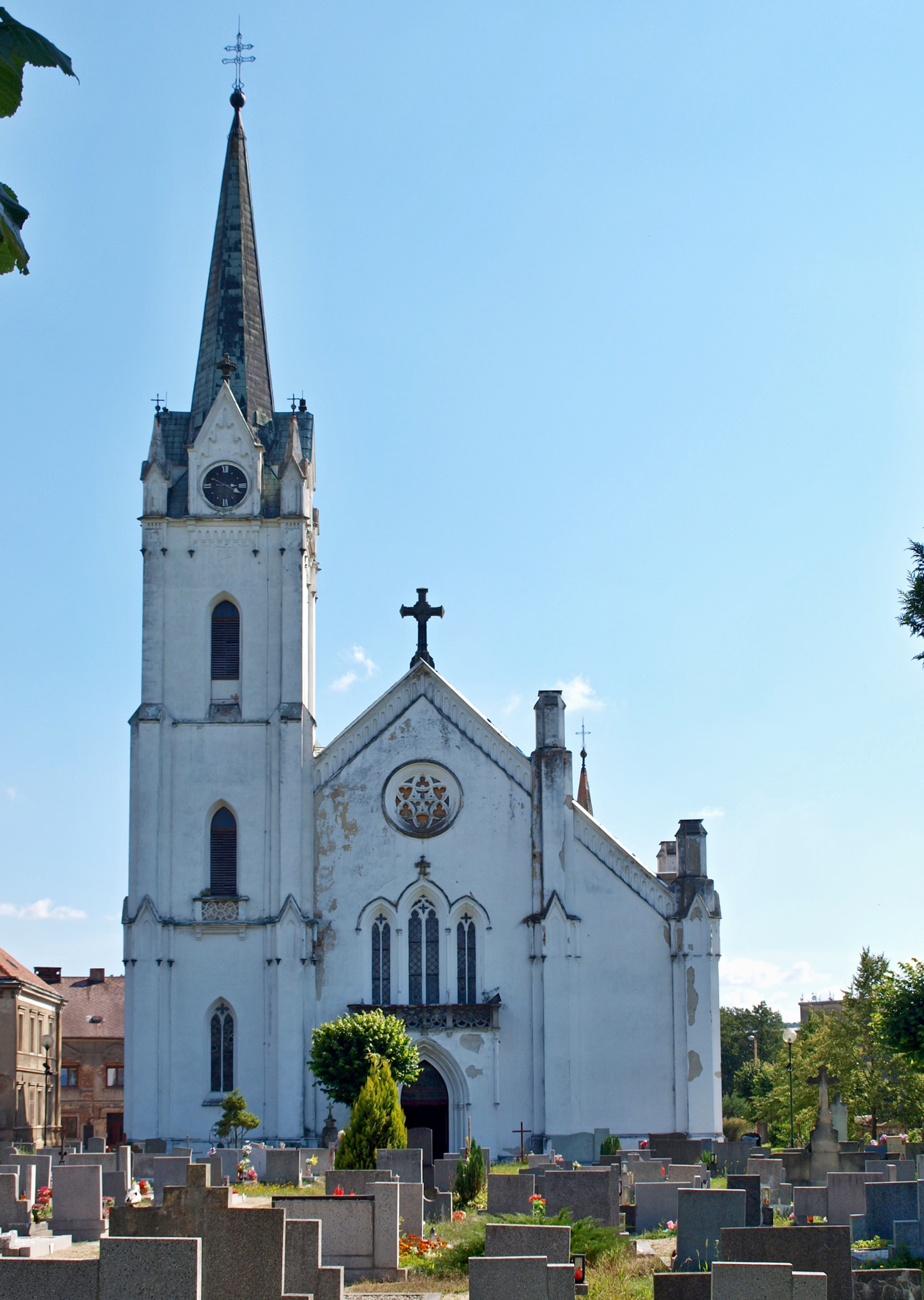 Kostel svatého Fabiána a Šebestiána (Zákupy)